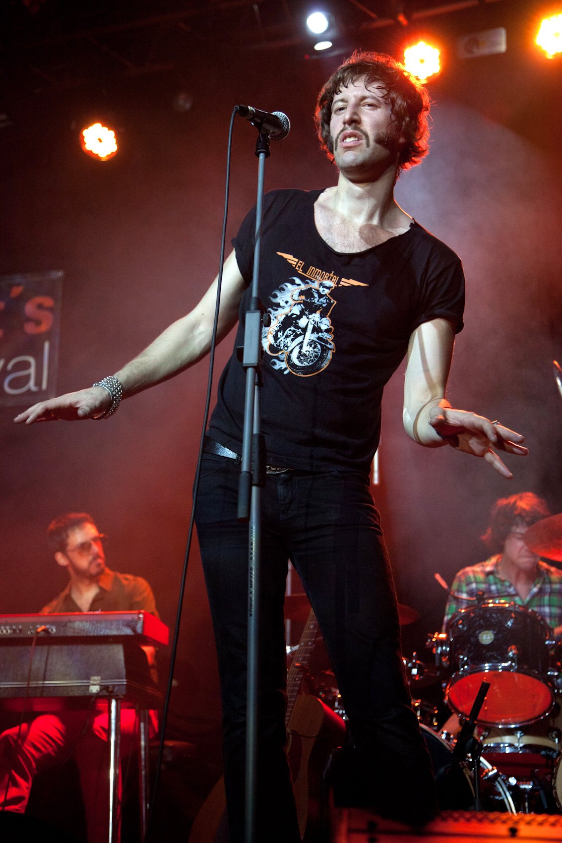 Adanowsky